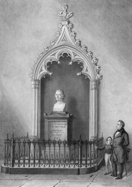 Johannes Henricus van der Palm (1763-1840), huisleraar bij J. A. van der Perre te Middelburg (1787-1794), leider der Patriotten, lid municipale raad van Middelburg (28 mei-28 juli 1795), representant van het Volk van Zeeland (22 okt. 1795-22 apr. 1796), daarna hoogleraar. Borstbeeld op gedenkteken in de St. Pieterskerk te Leiden. Staalgravure door J.B. Tetar van Elven. Zeeuws Archief, KZGW, Zelandia Illustrata, cat.nr. ZI-IV-0709.